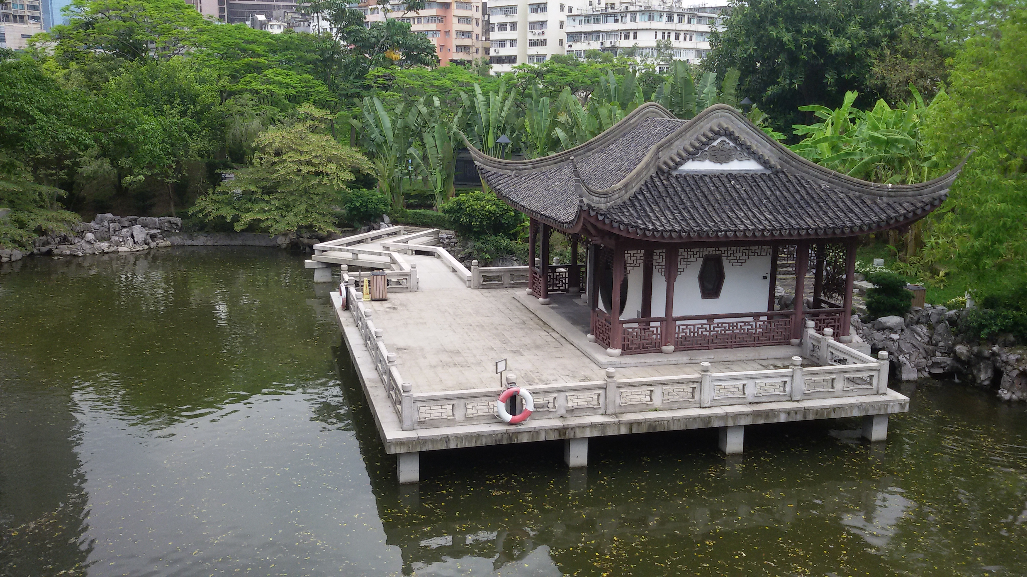 粵語: 喺九龍寨城嘅一處古建築，THE AMAZING RACE深圳衛視版第一季倒數第二站嚟過呢度拍。